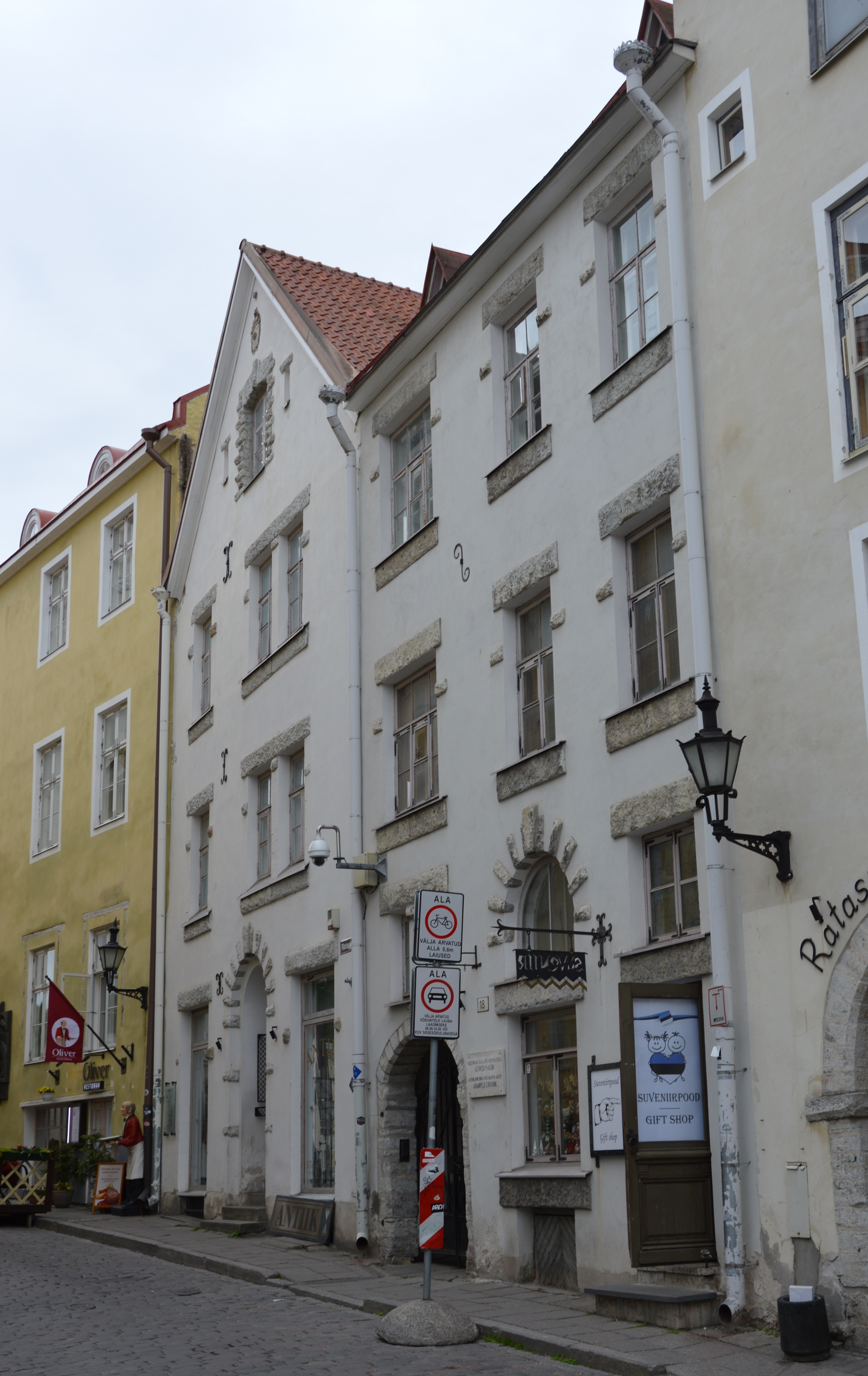 Haus Raderstraße 18 (Rataskaevu tänav 18)